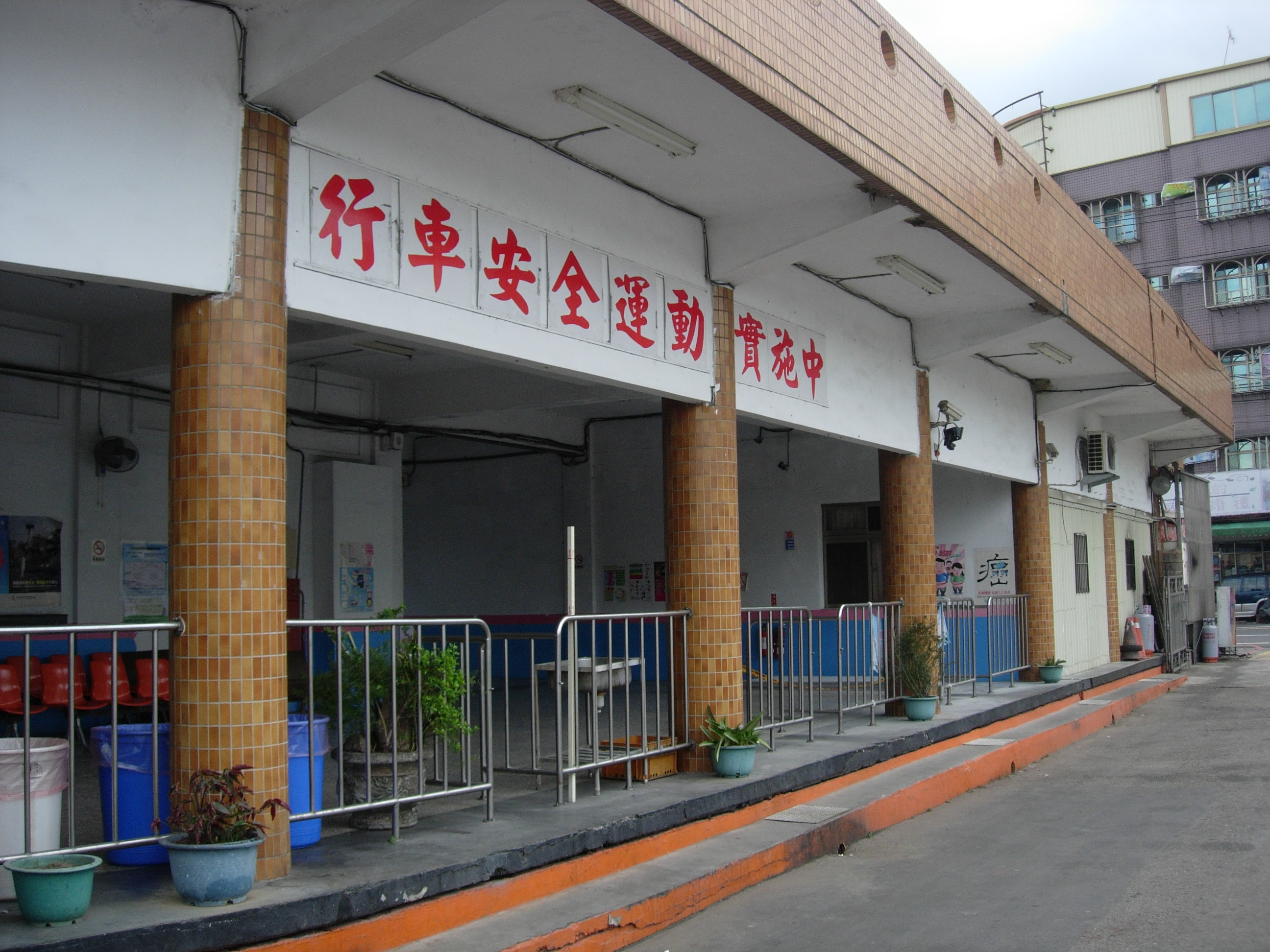 中文（台灣）: 新竹客運下公館站月台外觀